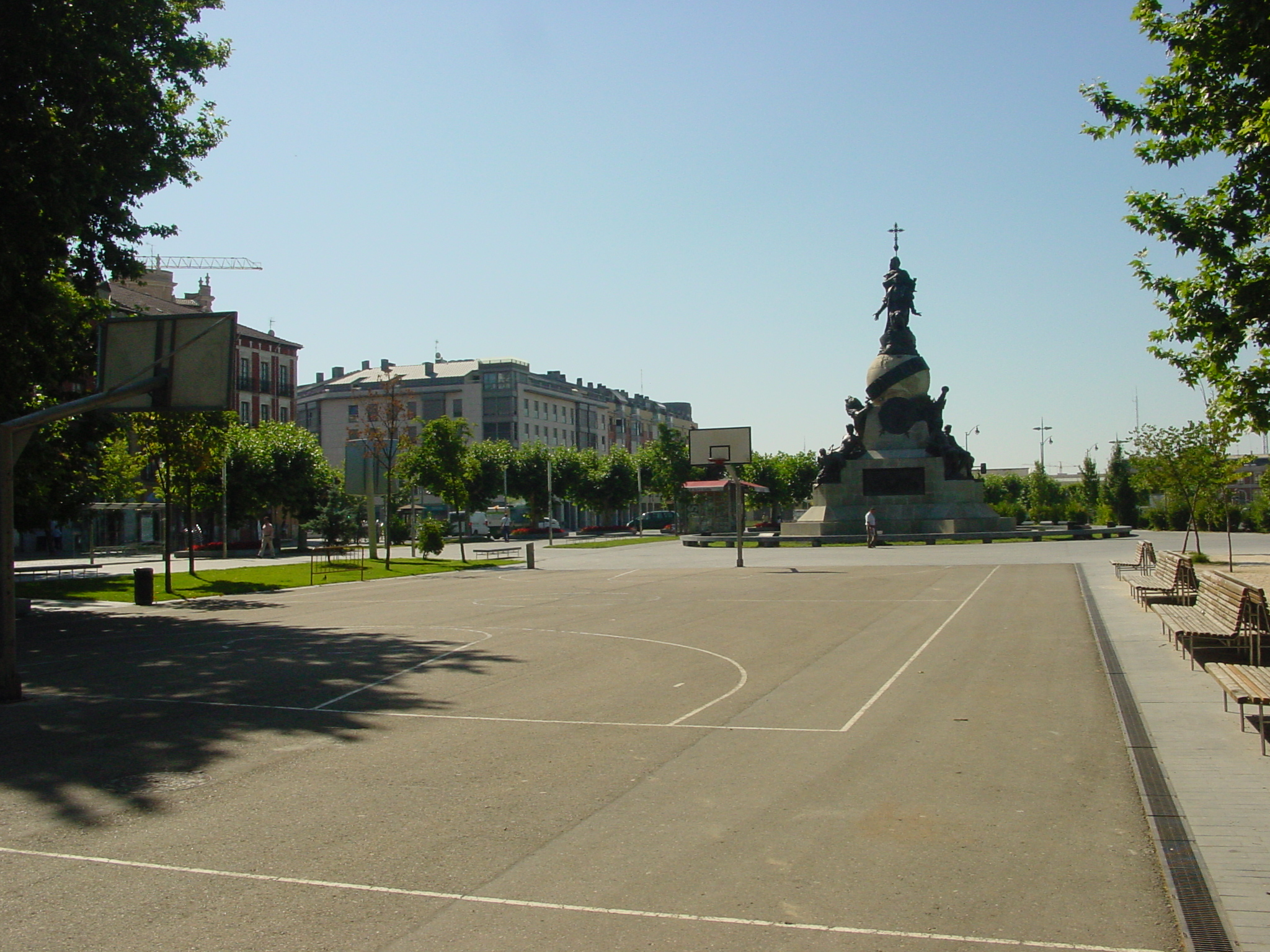 Valladolid (España). Paseo Central del Campo Grande, al fondo, el monumento a Colón.